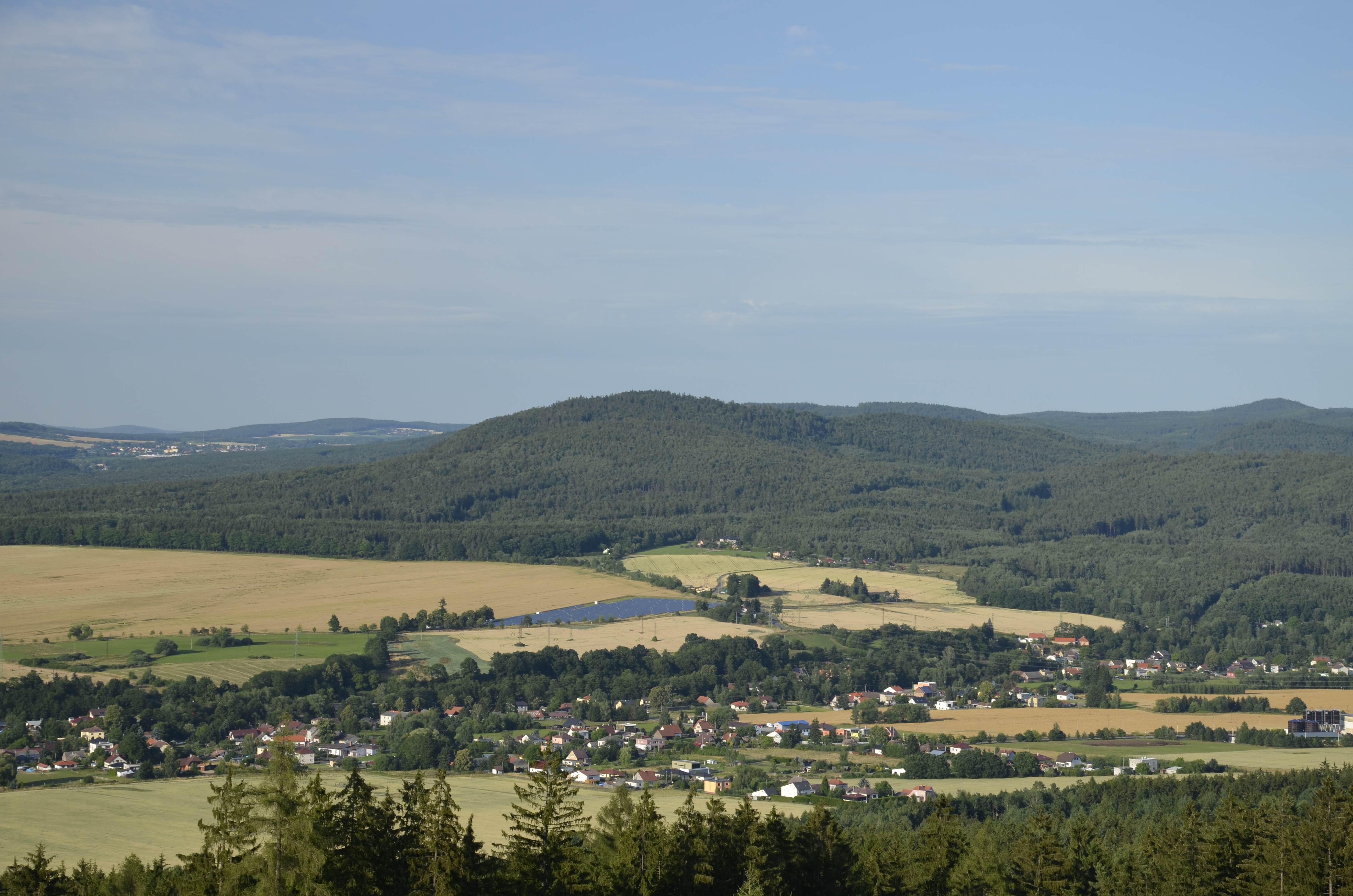 Žďár (629 m), hora v okrese Rokycany, pohled z jihozápadu z Kotle (575 m)